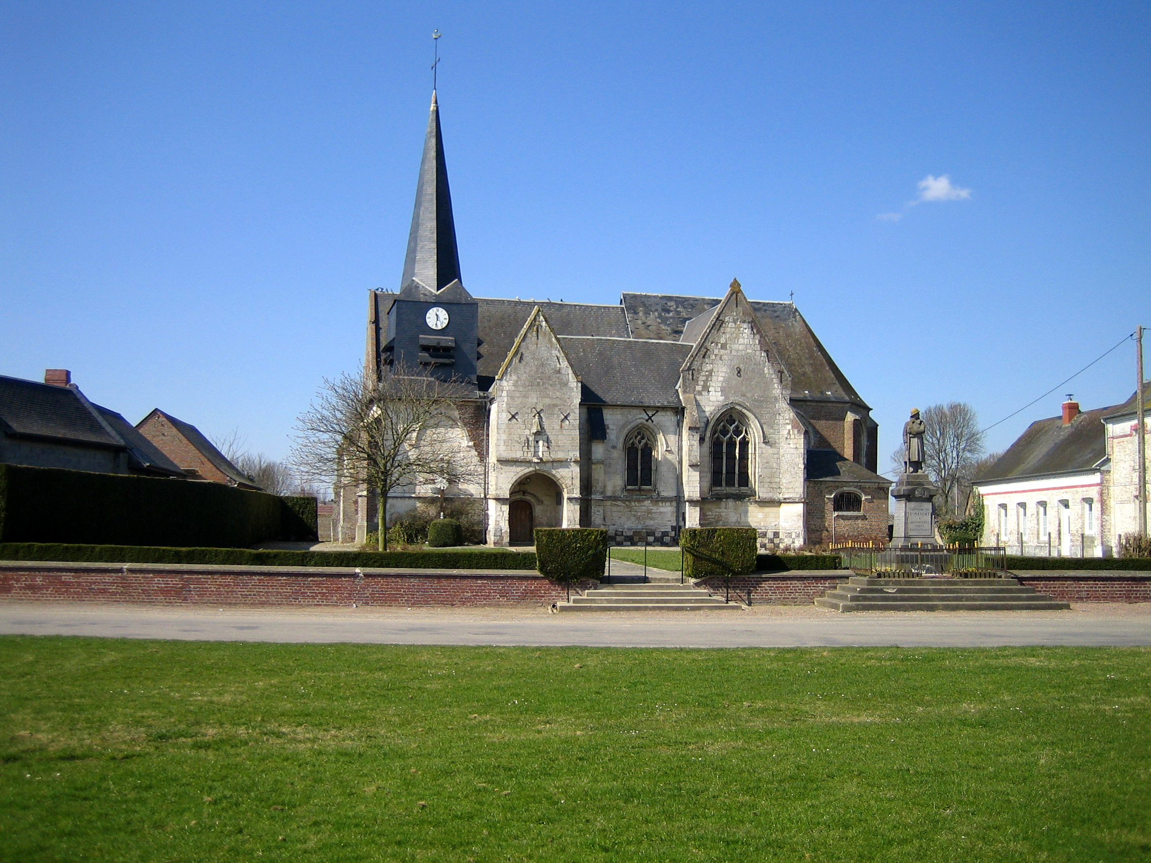 Saint-Maxent (Somme, France) - L'église et le monument-aux-morts.